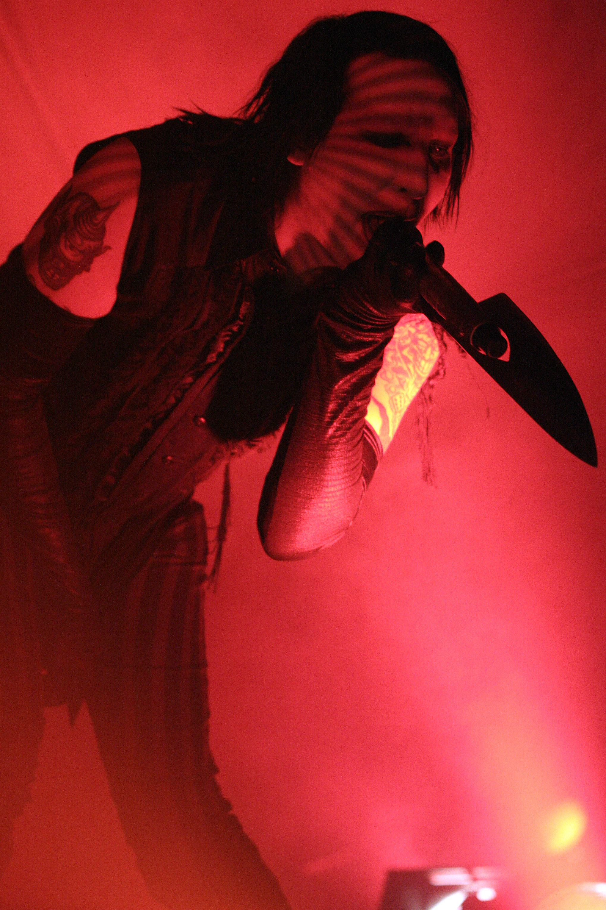 manson en concierto